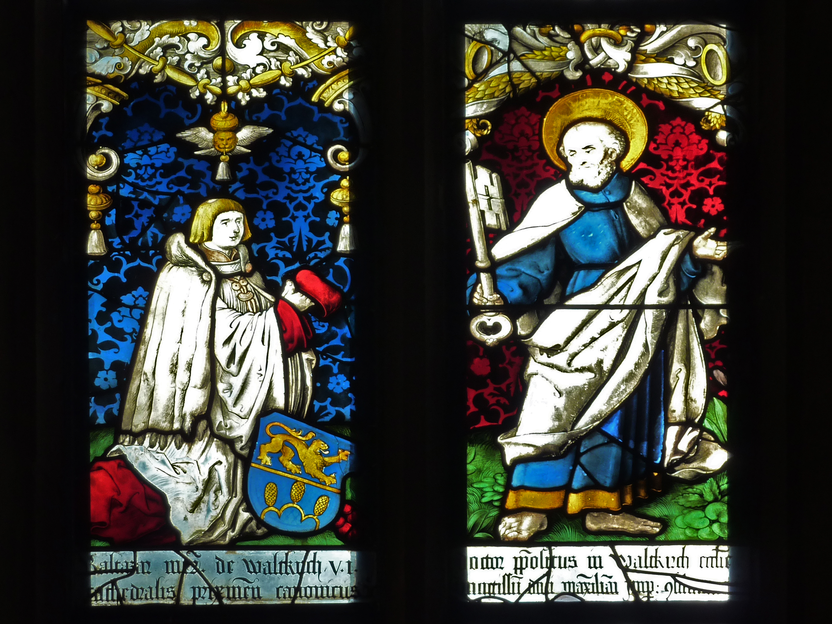 Fenster von Hans Baldung Grien in der Kirche St. Georg, Gutach-Bleibach.